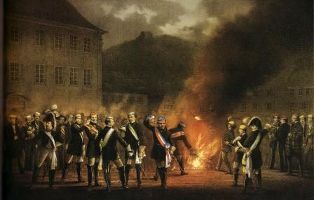 Fackelzug des Heidelberger Senioren-Convents am 30. Januar 1857